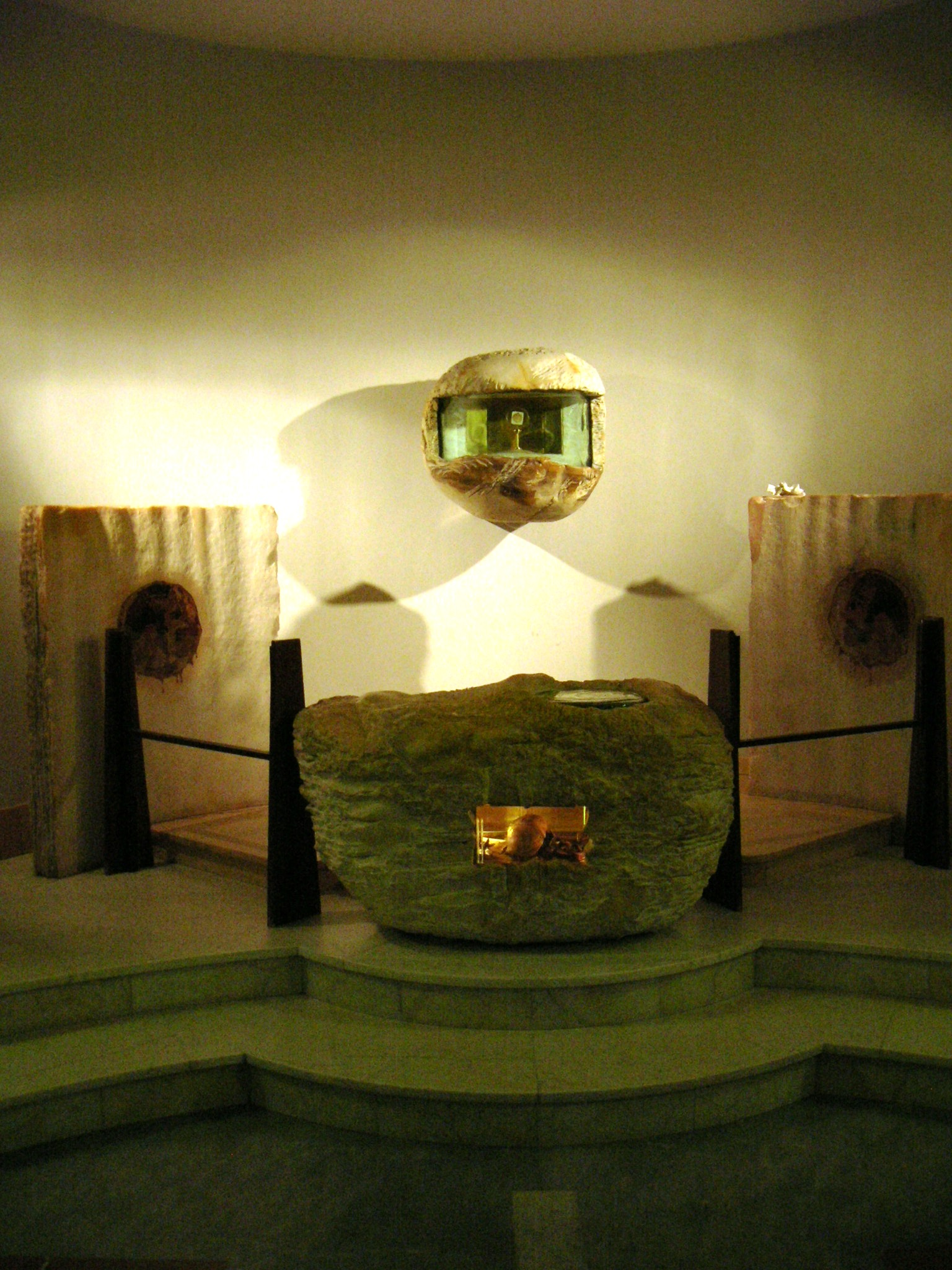 Basilica inferiore